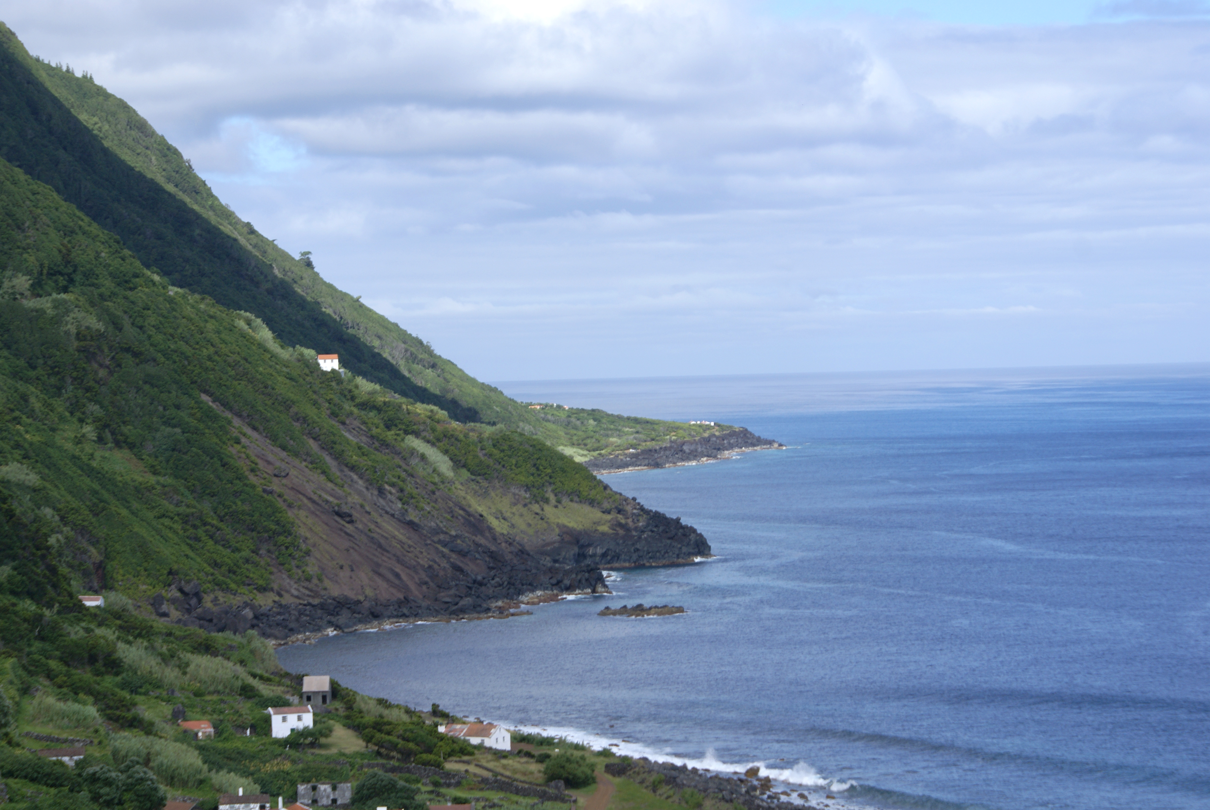 Fajã das Pontas, falésia, Norte Pqueno, Calheta, ilha de São Jorge, Açores